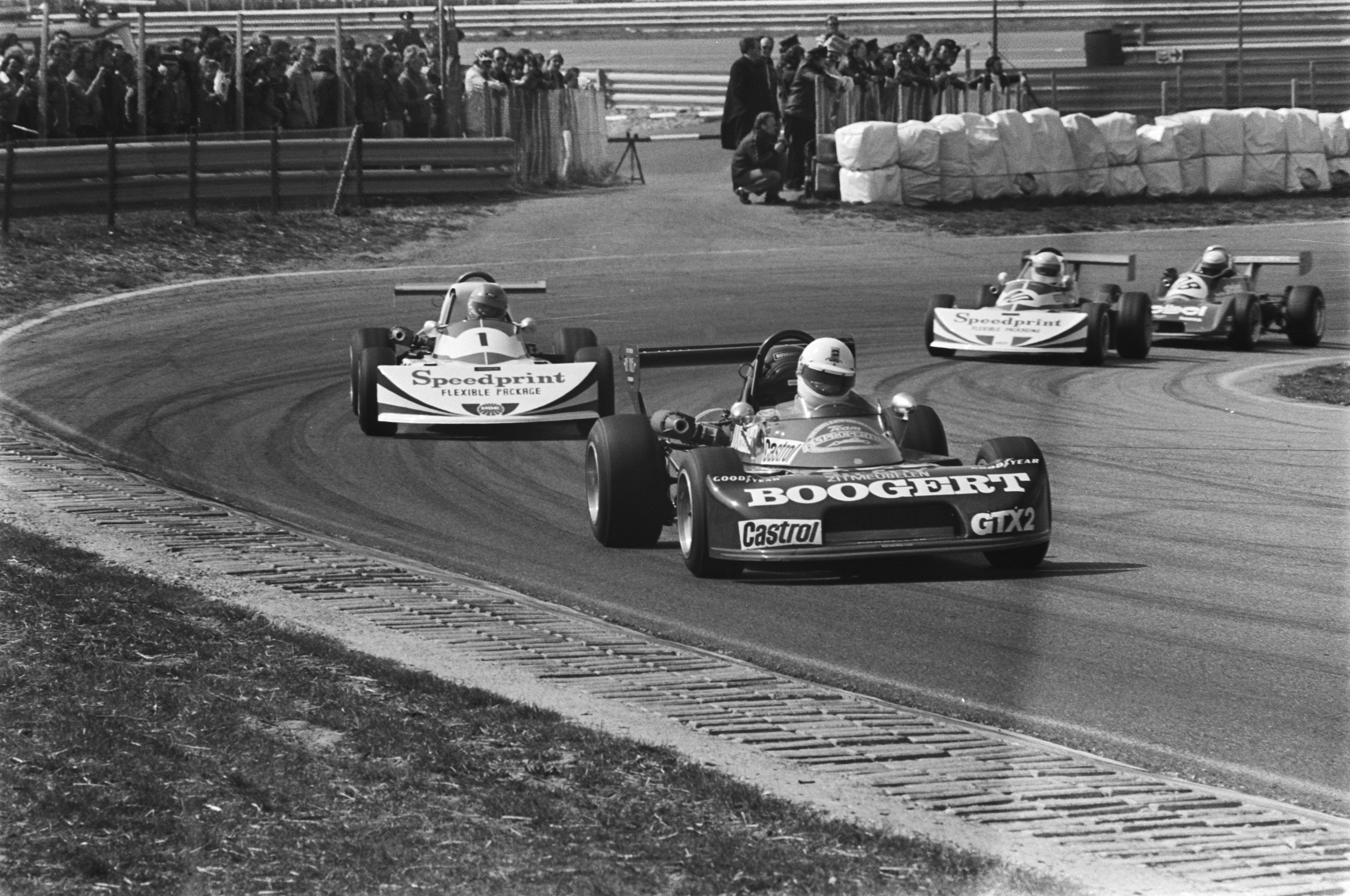 Collectie / Archief : Fotocollectie Anefo Reportage / Serie : [ onbekend ] Beschrijving : Paasraces op Zandvoort ( Formule III ); Boye Haye (44) op kop, gevolgd door Andersson (1) Datum : 19 april 1976 Locatie : Noord-Holland, Zandvoort Trefwoorden : autoraces Persoonsnaam : Andersson, Formule III Fotograaf : Croes, Rob C. / Anefo Auteursrechthebbende : Nationaal Archief Materiaalsoort : Negatief (zwart/wit) Nummer archiefinventaris : bekijk toegang 2.24.01.05 Bestanddeelnummer : 928-5289